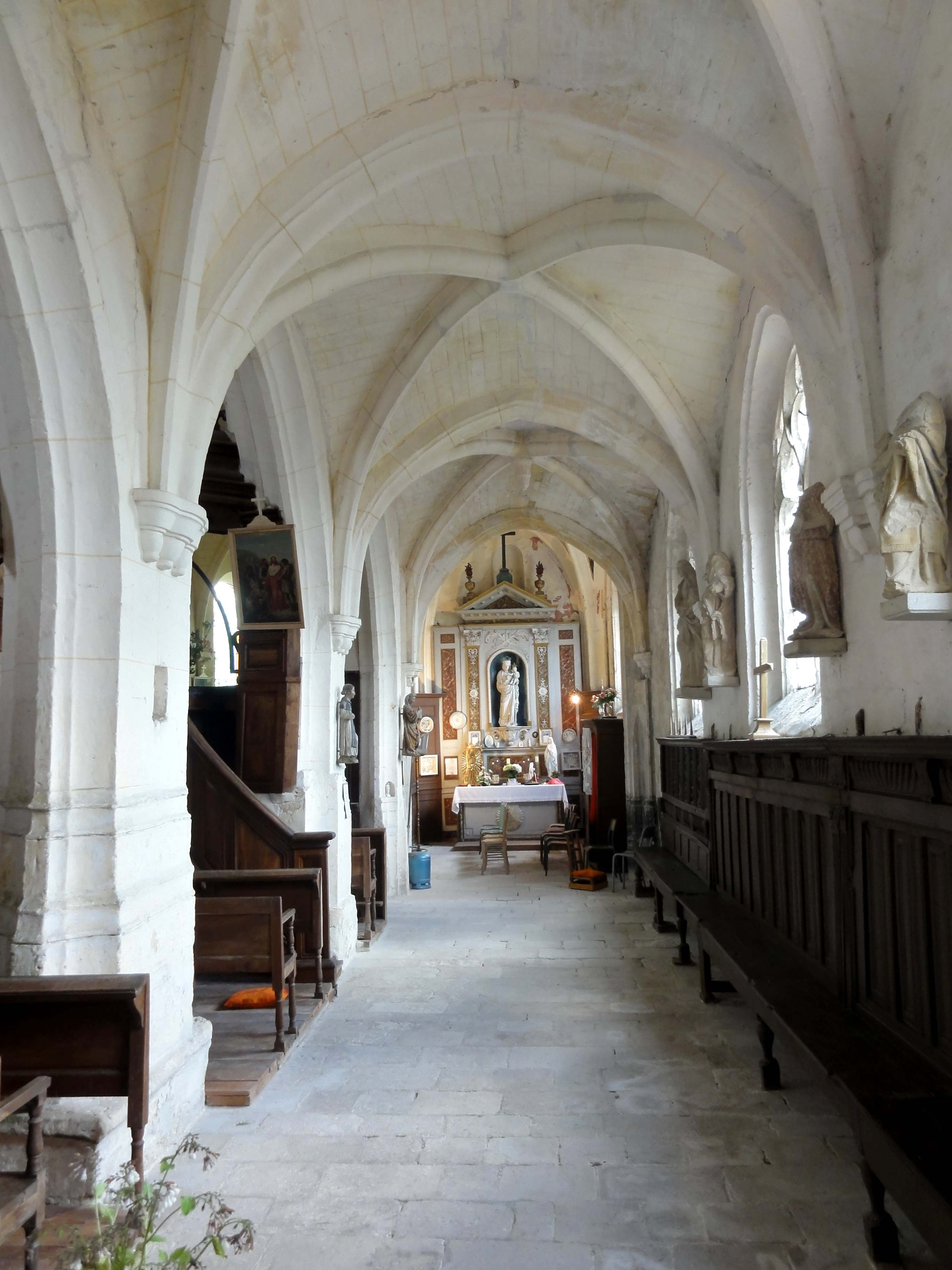 Intérieur de l'église - voir titre.